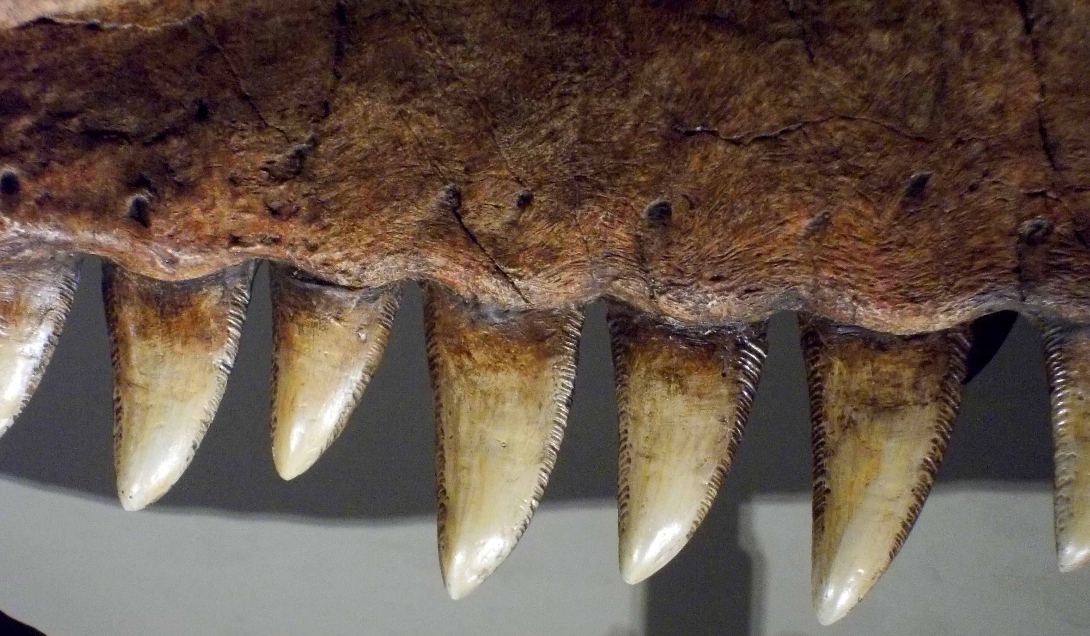 Denti di Carcharodontosauro